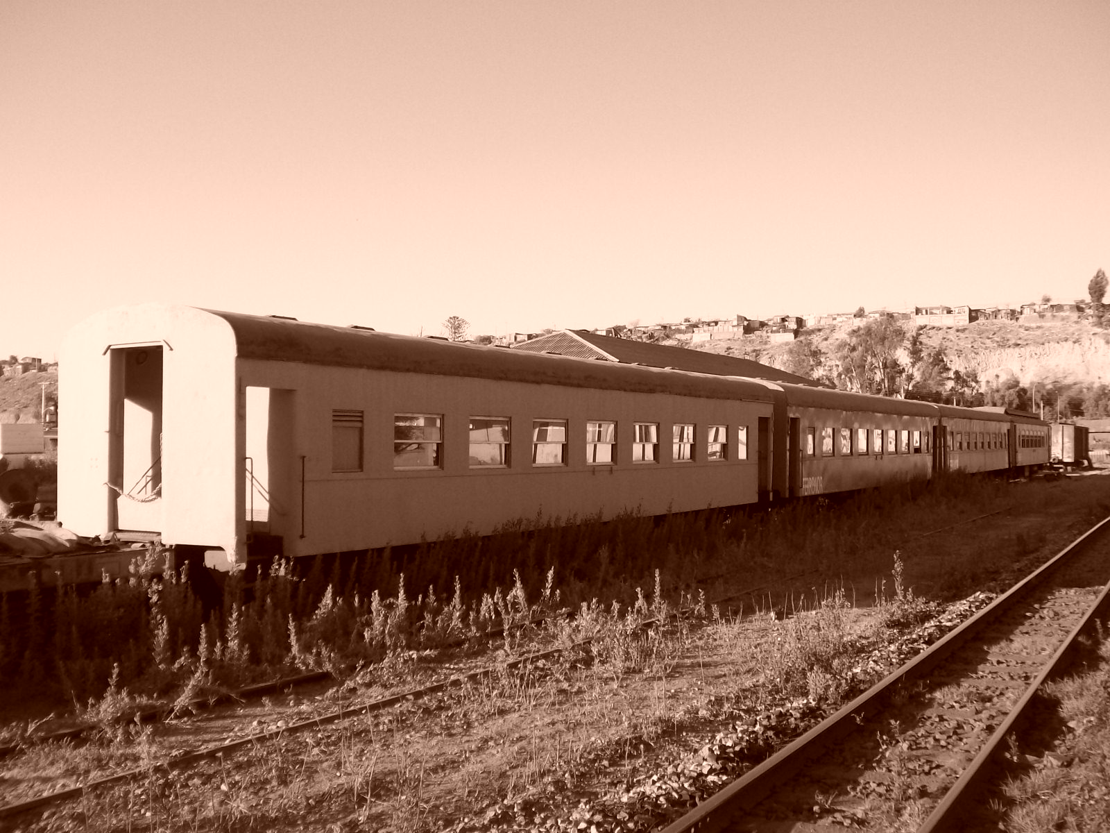 Despues de su salida en el Bicentenario de Chile, aun esta apartado, esperando a que alguna locomotora los haga rodar por el desierto.